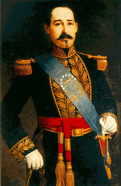 Staatsieportret Francisco Robles García. President van Ecuador 1856-59.